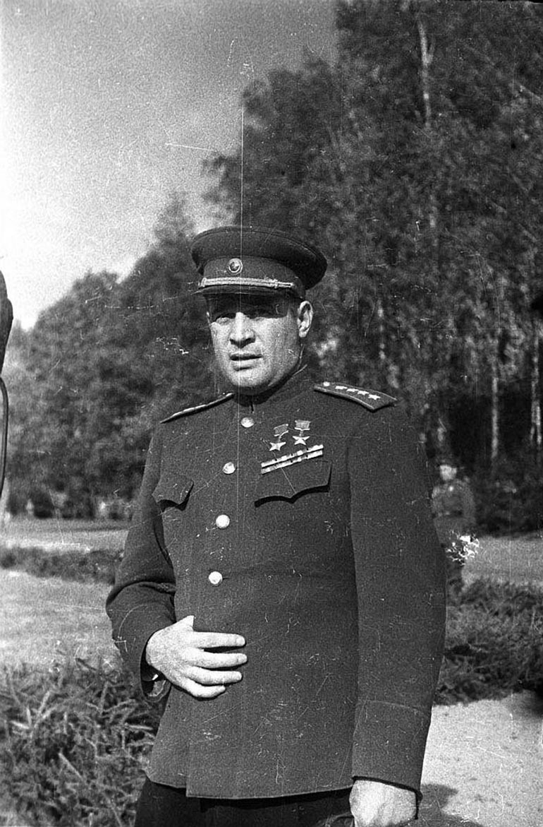 Иван Данилович Черняховский (1907 — 1945) — советский военачальник, генерал армии